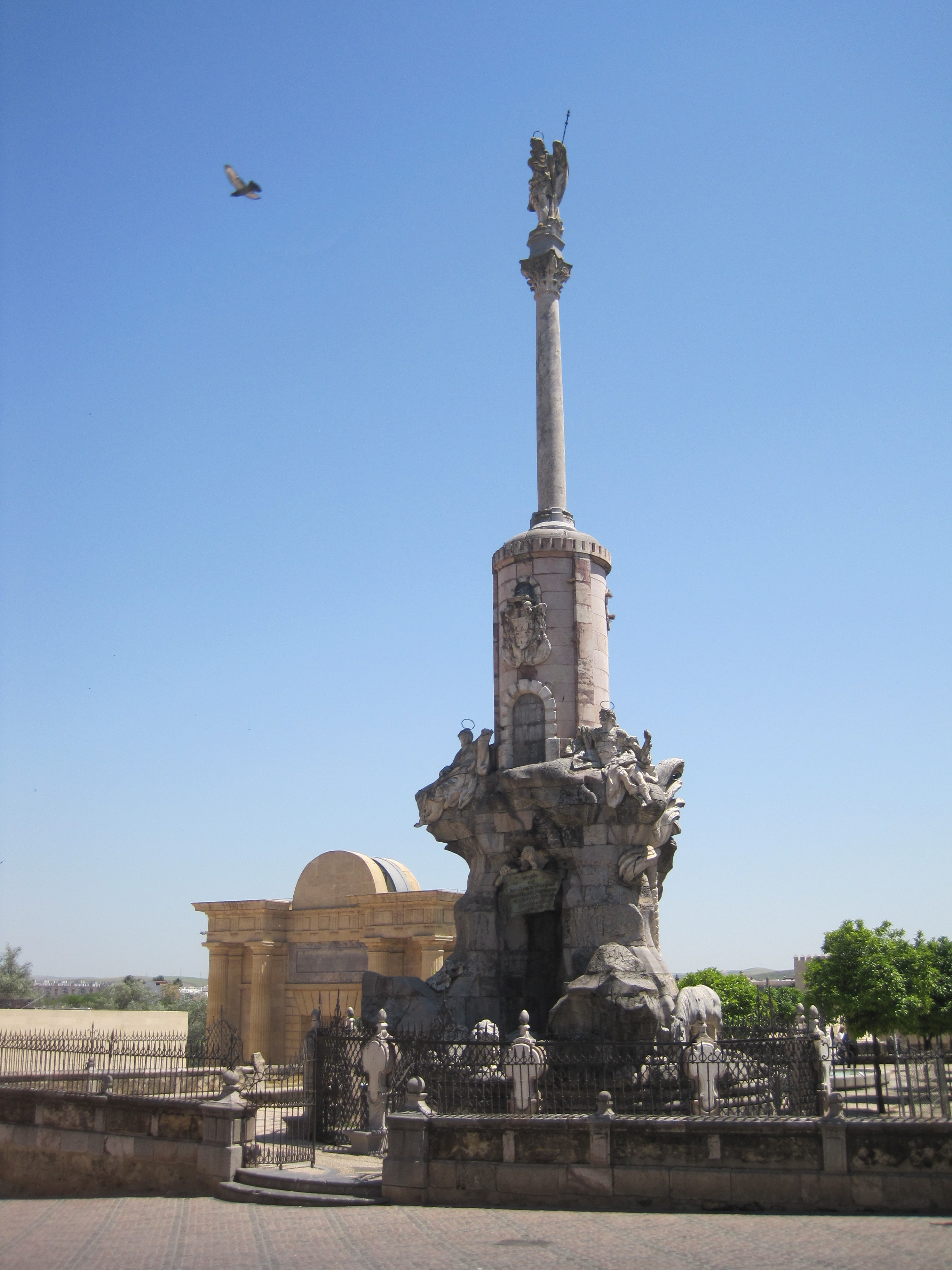 Monumento Arcángel San Rafael, Córdoba (España).